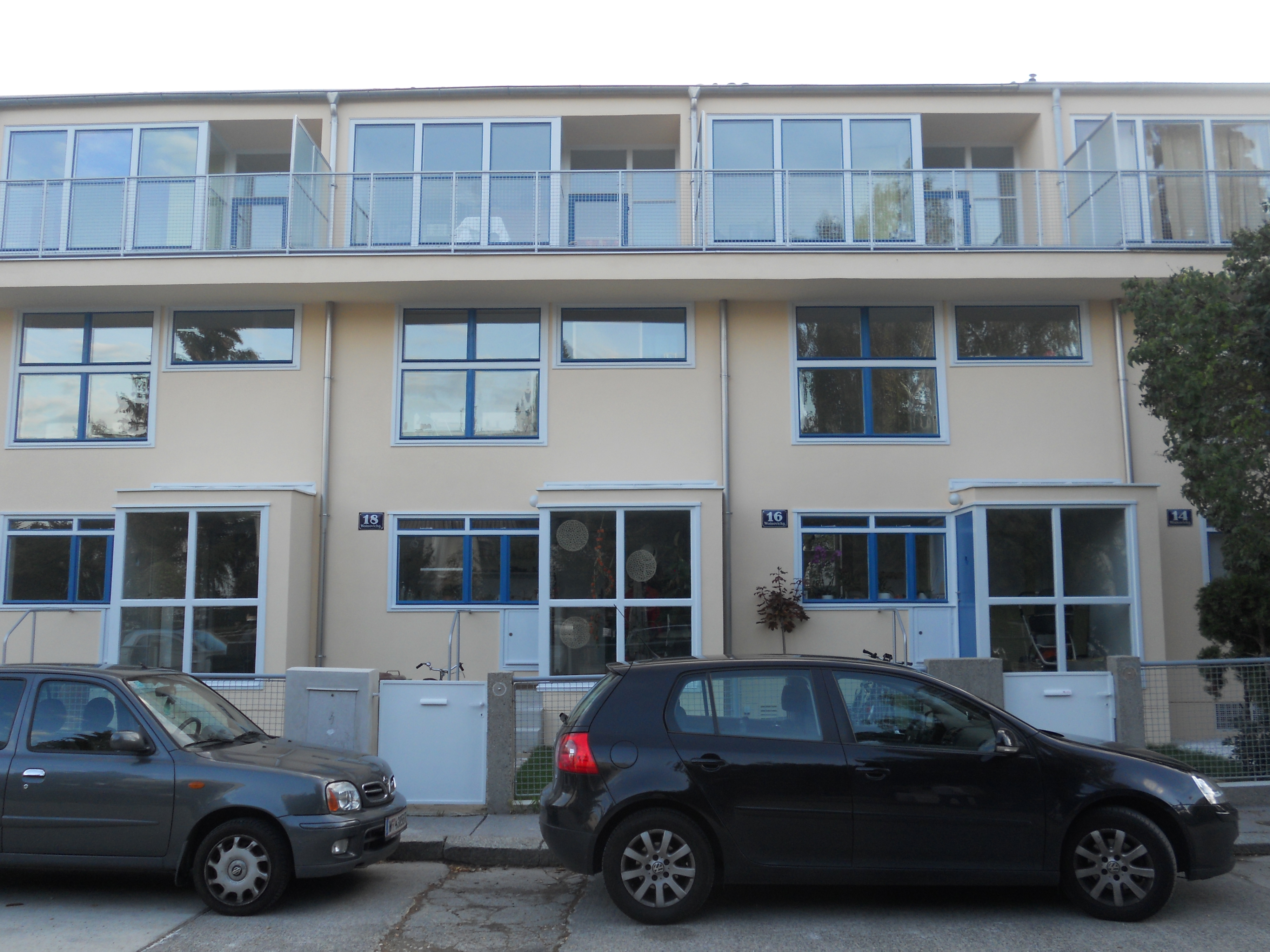 Wohnhaus mit Einfriedung - Werkbundsiedlung, Woinovichgasse 14-20